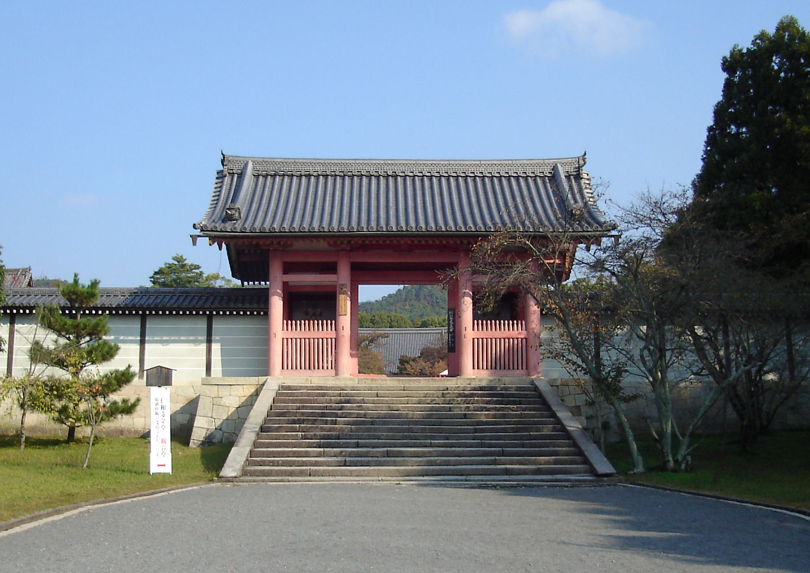 Ninnaji Chumon